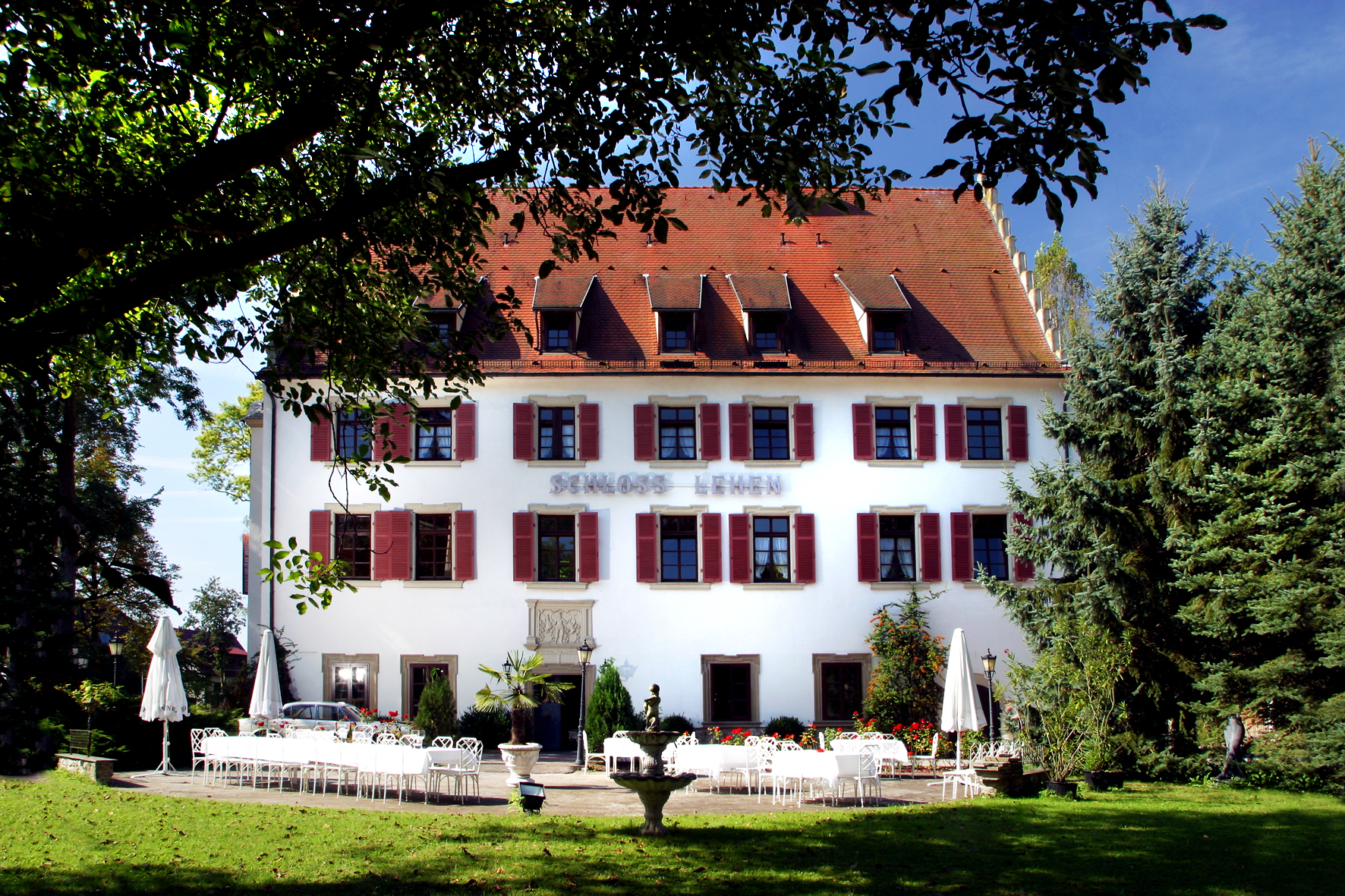 Schloss Lehen in Bad Friedrichshall-Kochendorf